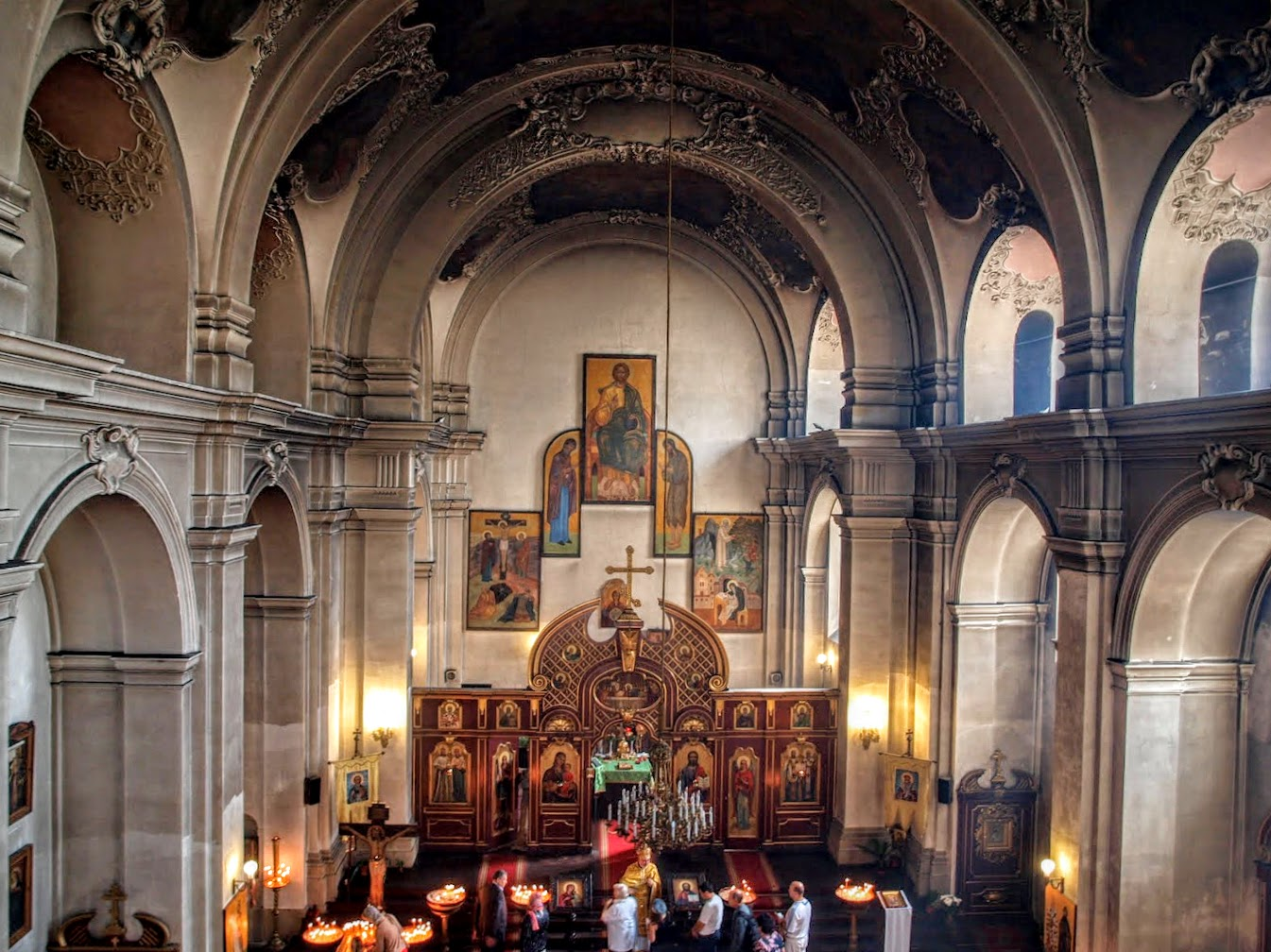 Interiér chrámu sv. Cyrila a Metoděje v Praze